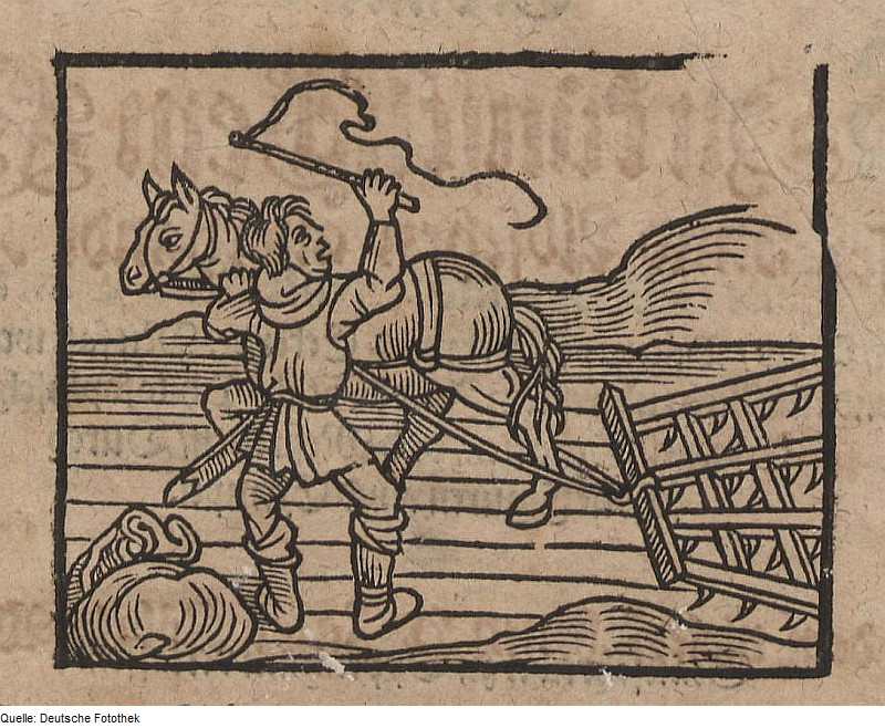 Original image description from the Deutsche Fotothek Ackerbau & Pferd & Egge